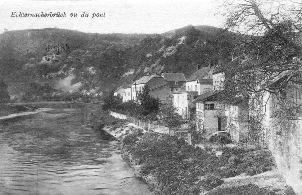 Vue op Iechternacherbréck, Postkaart vum J.M. Bellwald.